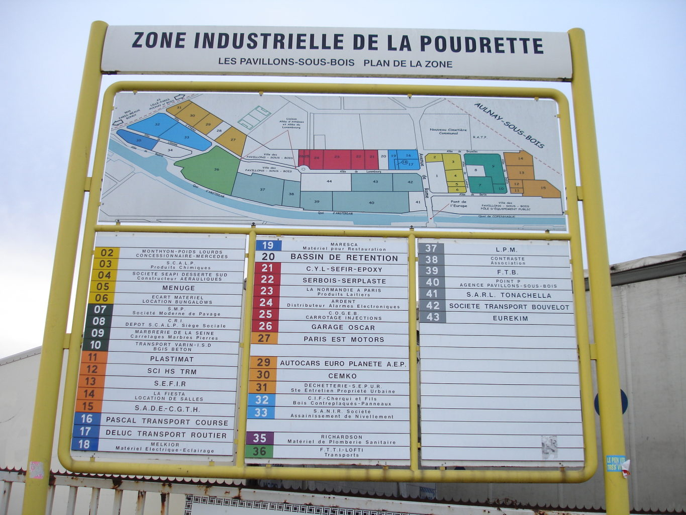 Les Pavillons-sous-Bois (France) - La zone industrielle de la Poudrette - mars 2007 Photo personnelle (own work) de clicsouris